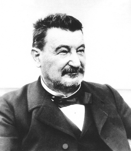 Aristide Bergès, ingénieur hydraulique (1833-1904)